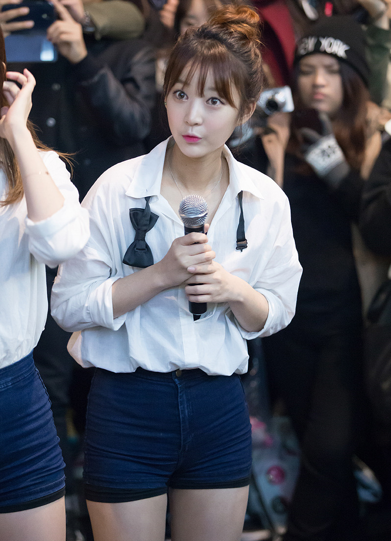 EXID Hyelin